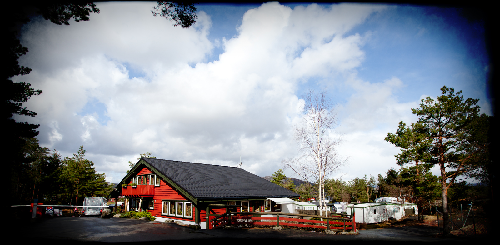 Grinde Camping